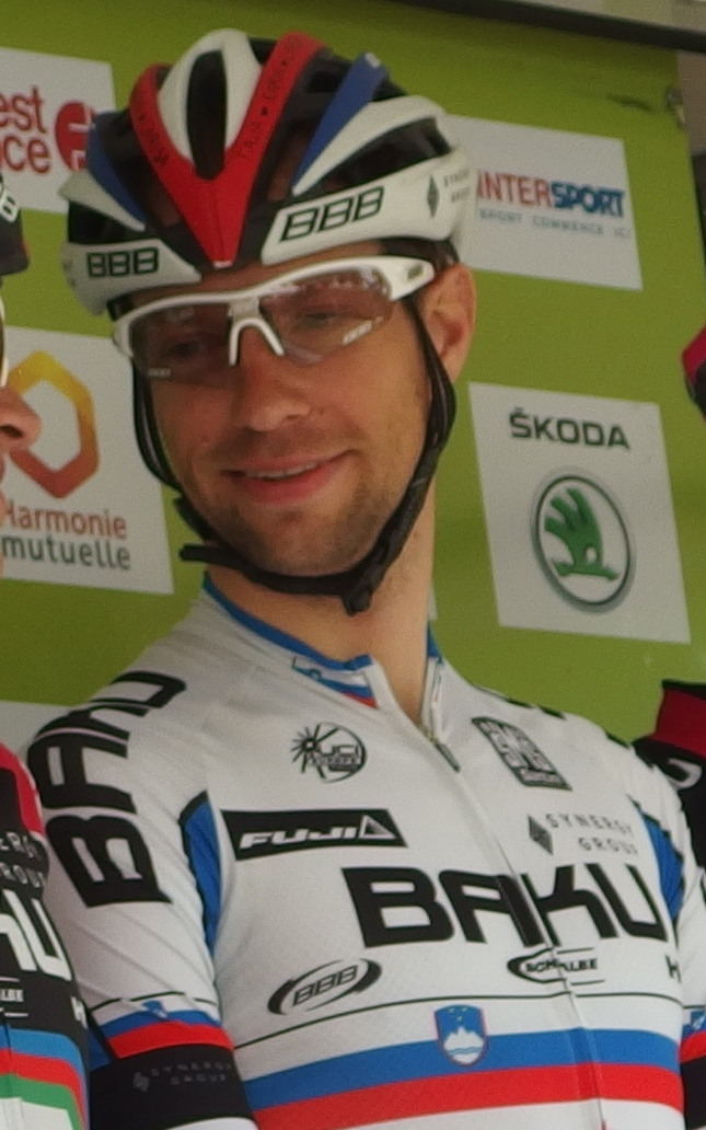 Tour de Bretagne 2015 - Présentation des équipes au départ de la troisième étape à Baud - Équipe Synergy Baku Project Depicted person: Matej Mugerli